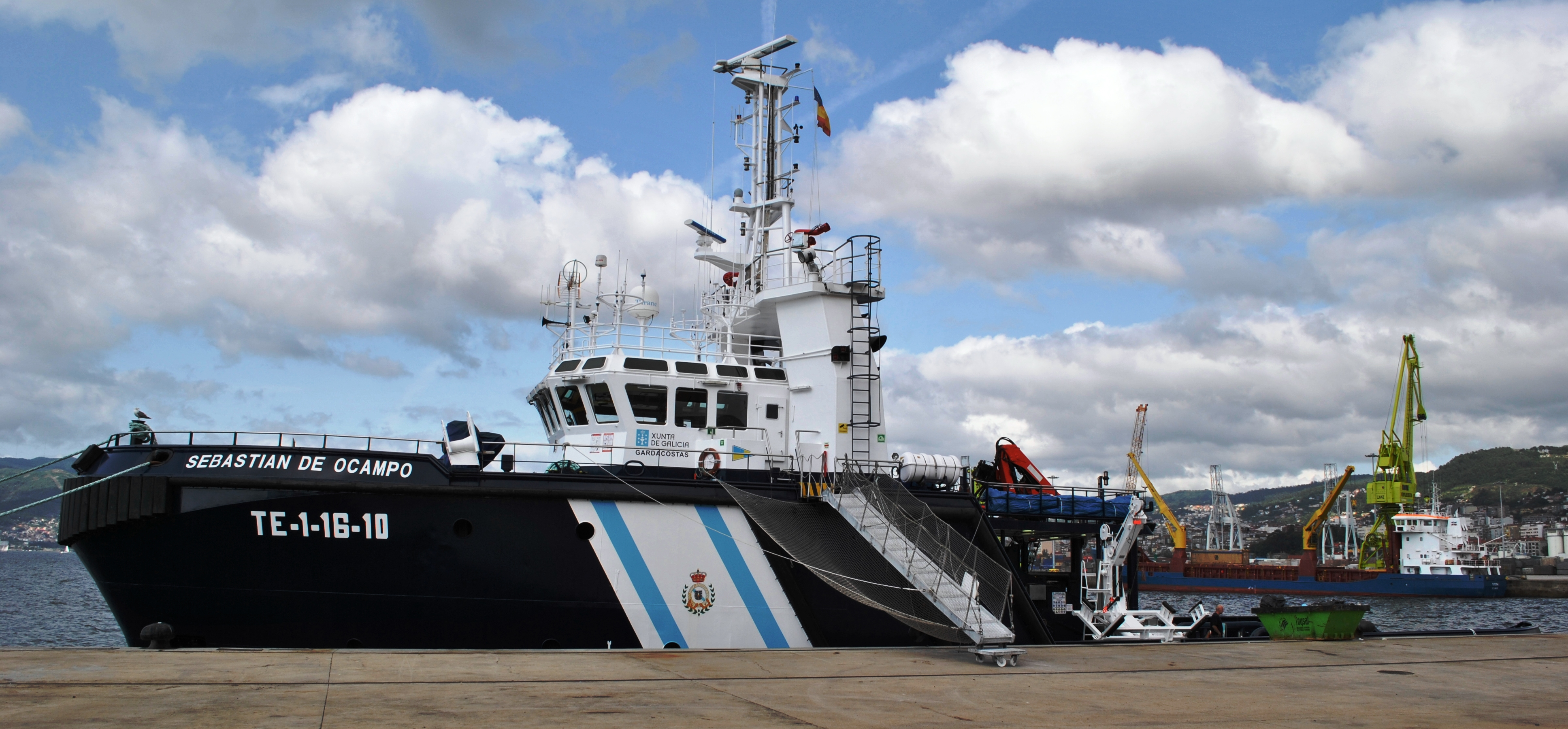 Vexa o título e as categorías.